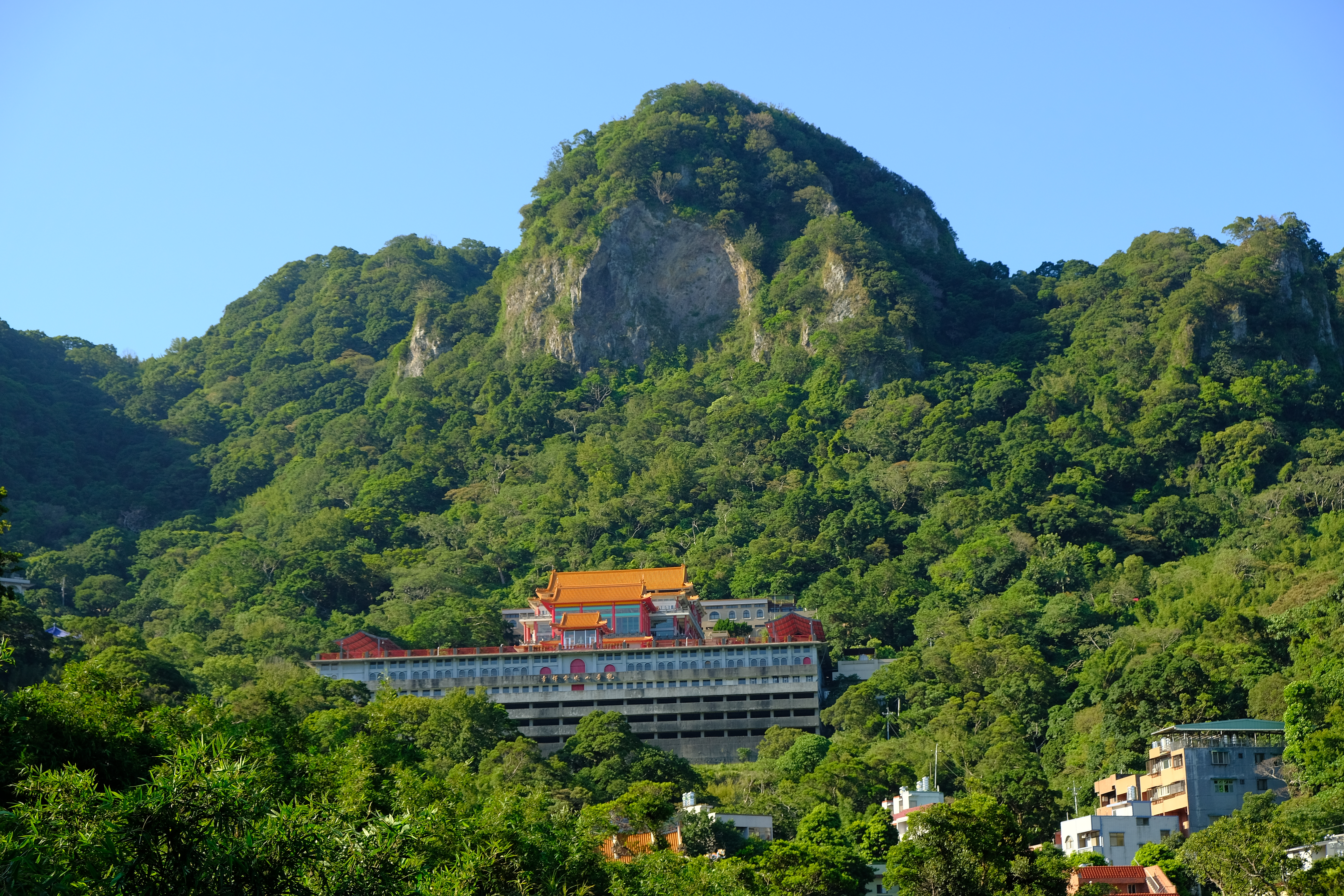 2018 Lingyun Zen Temple Août 新北市五股區凌雲禪寺